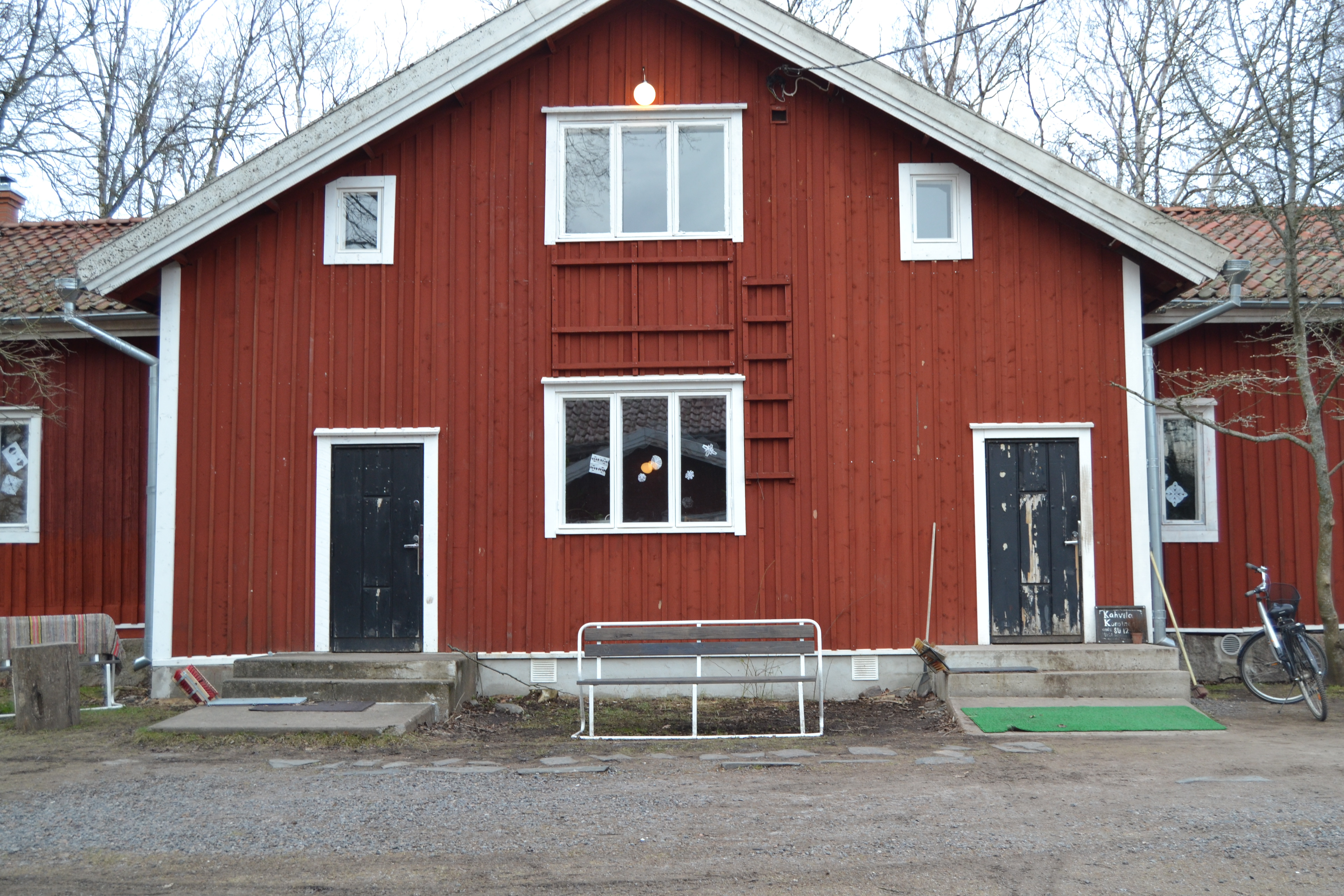 Koroisten maatilan päärakennus talvella 2020.